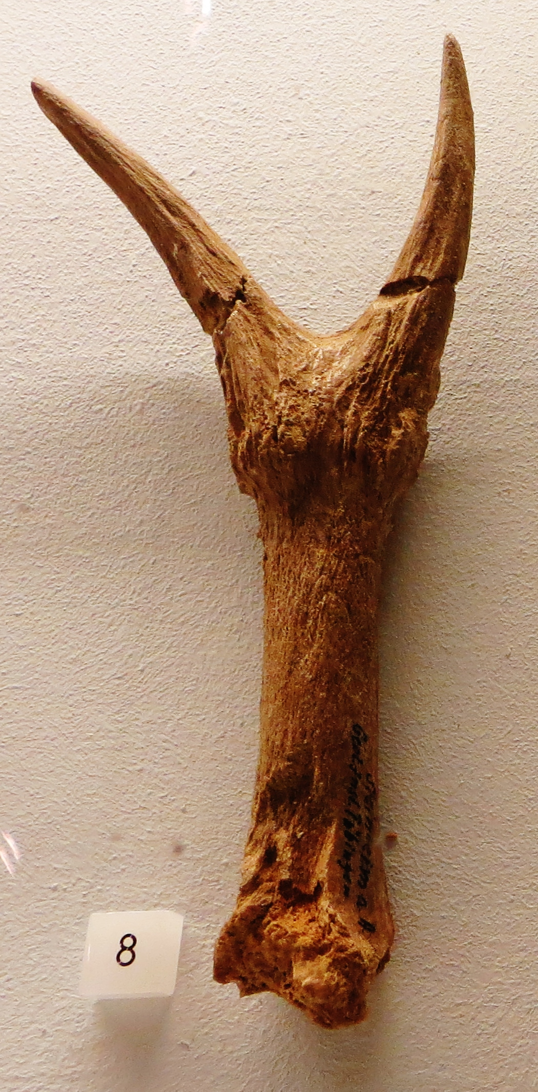 Fossil of Heteroprox, an extinct mammal - Took the picture at Museum of Paleontology, Tuebingen